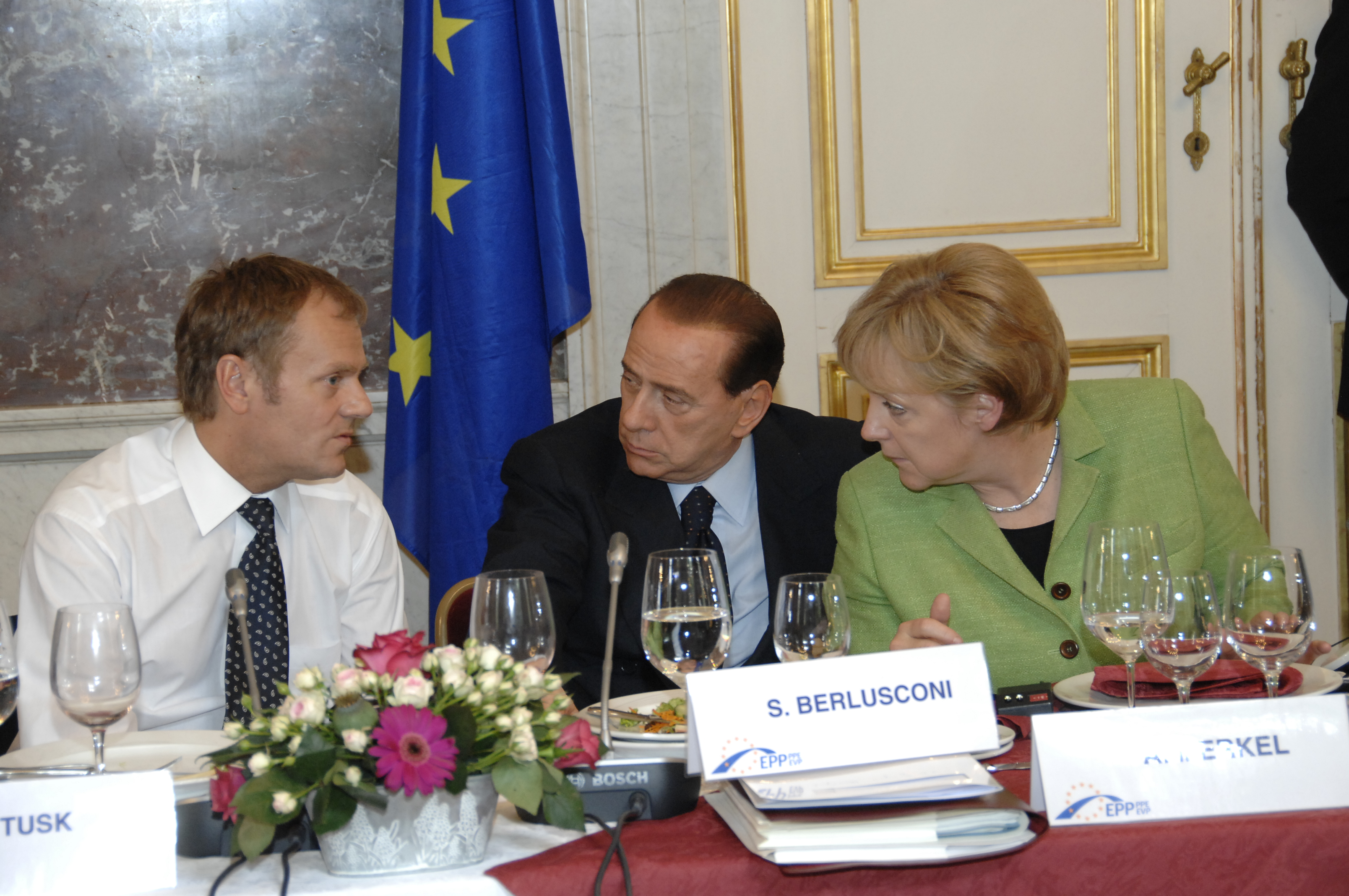 EPP Summit 19 June 2008